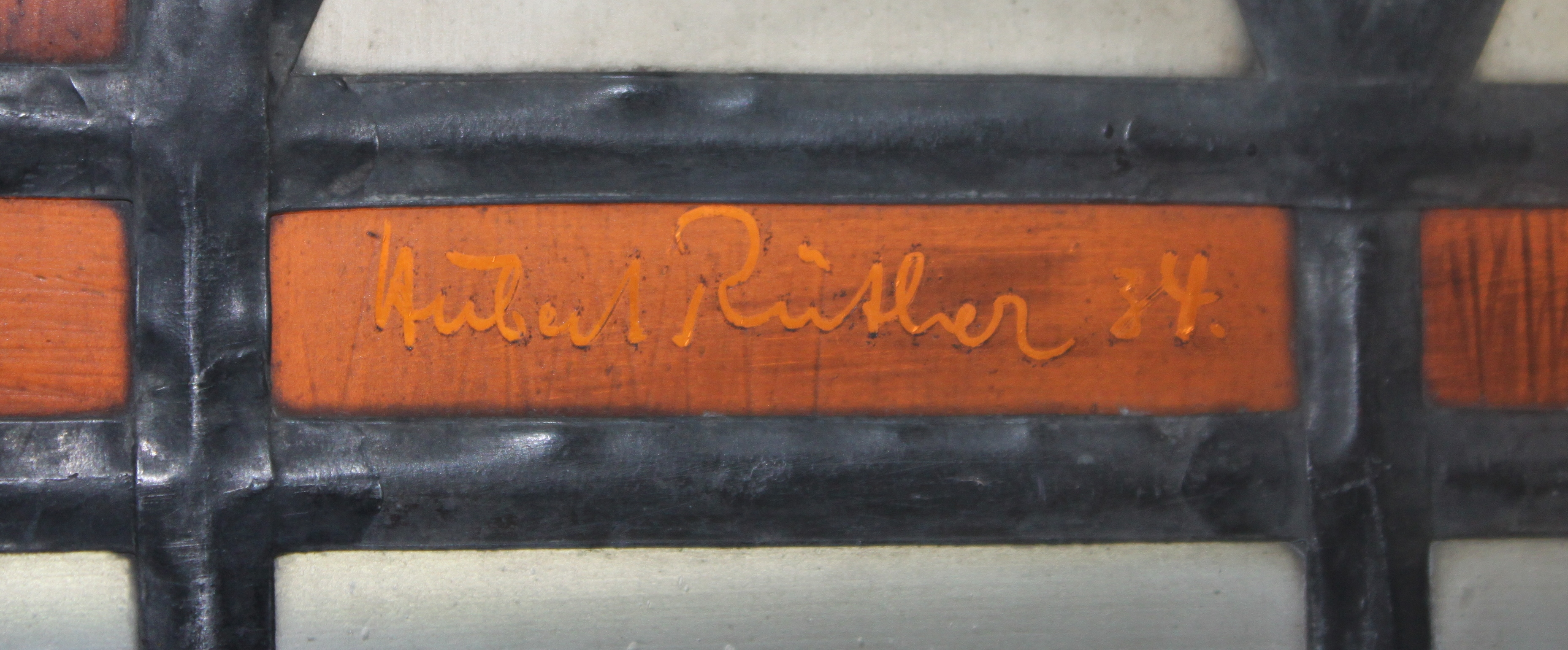 Signatur Hubert Rüthers im Fenster s VI unten der katholischen Pfarrkirche St. Mariä Himmelfahrt in Wittichenau